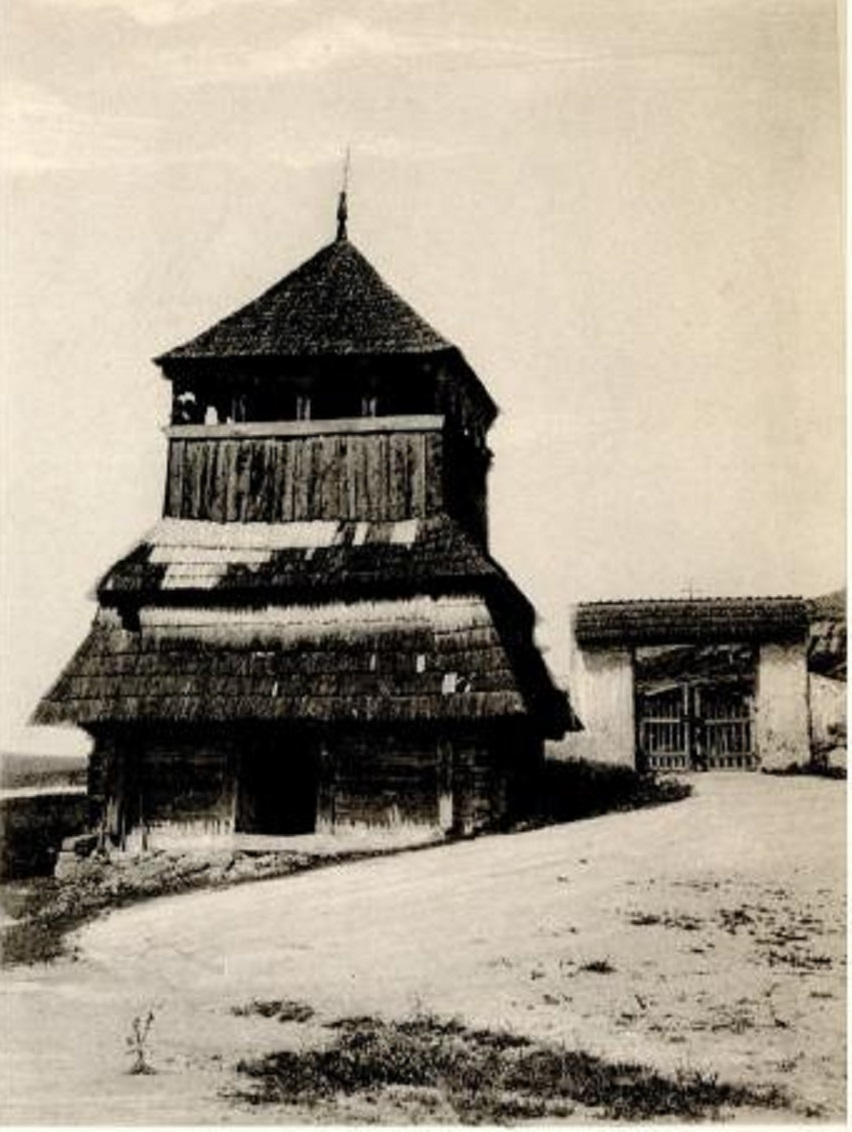 Дзвіниця Троїцької церкви в Зінькові 1726. Троїцька церква в Зінькові 1450. Мурована церква з гранчастим вівітарем. Верх перебудований на поч 20 ст.